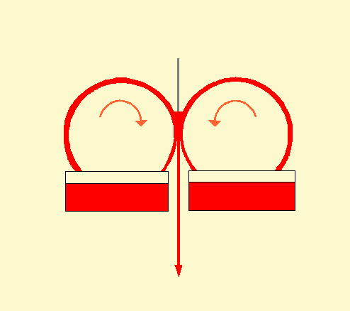 dessin perso libre de droit